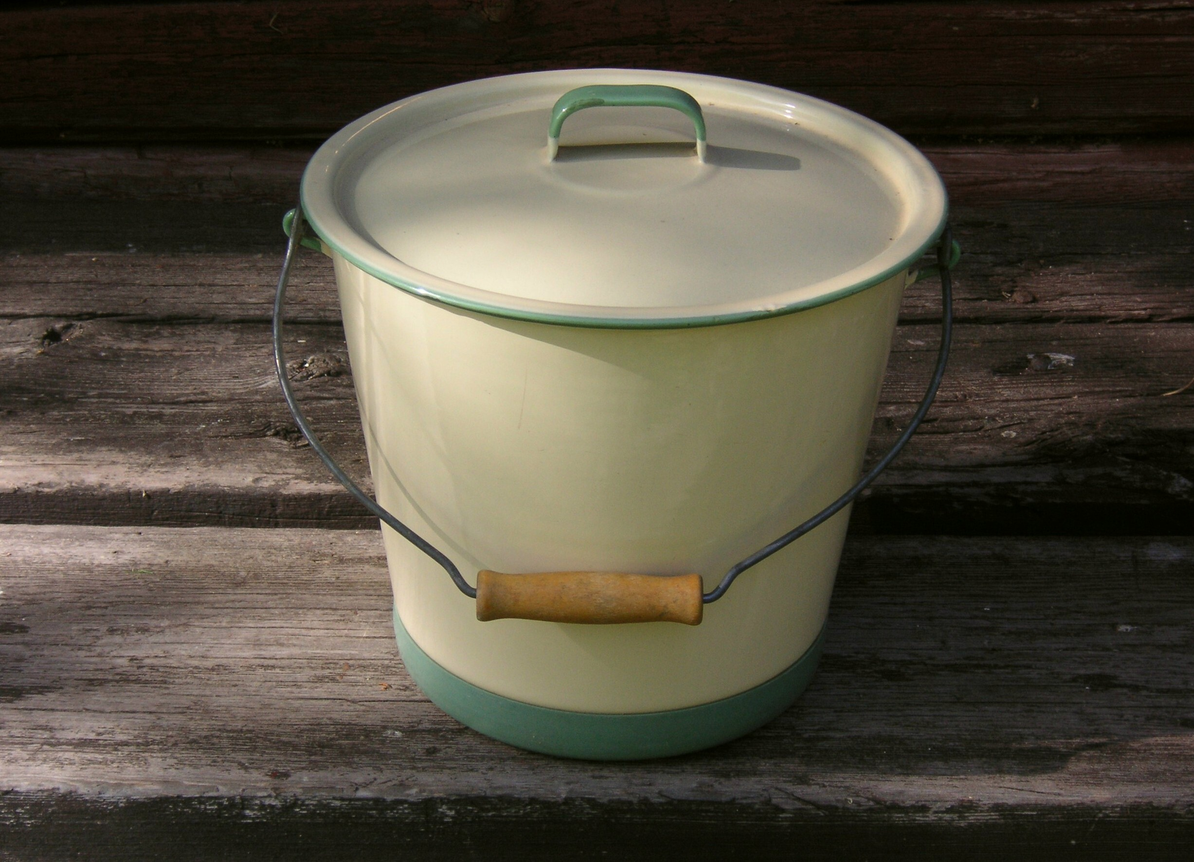 Kockums klassiska emalj-hink